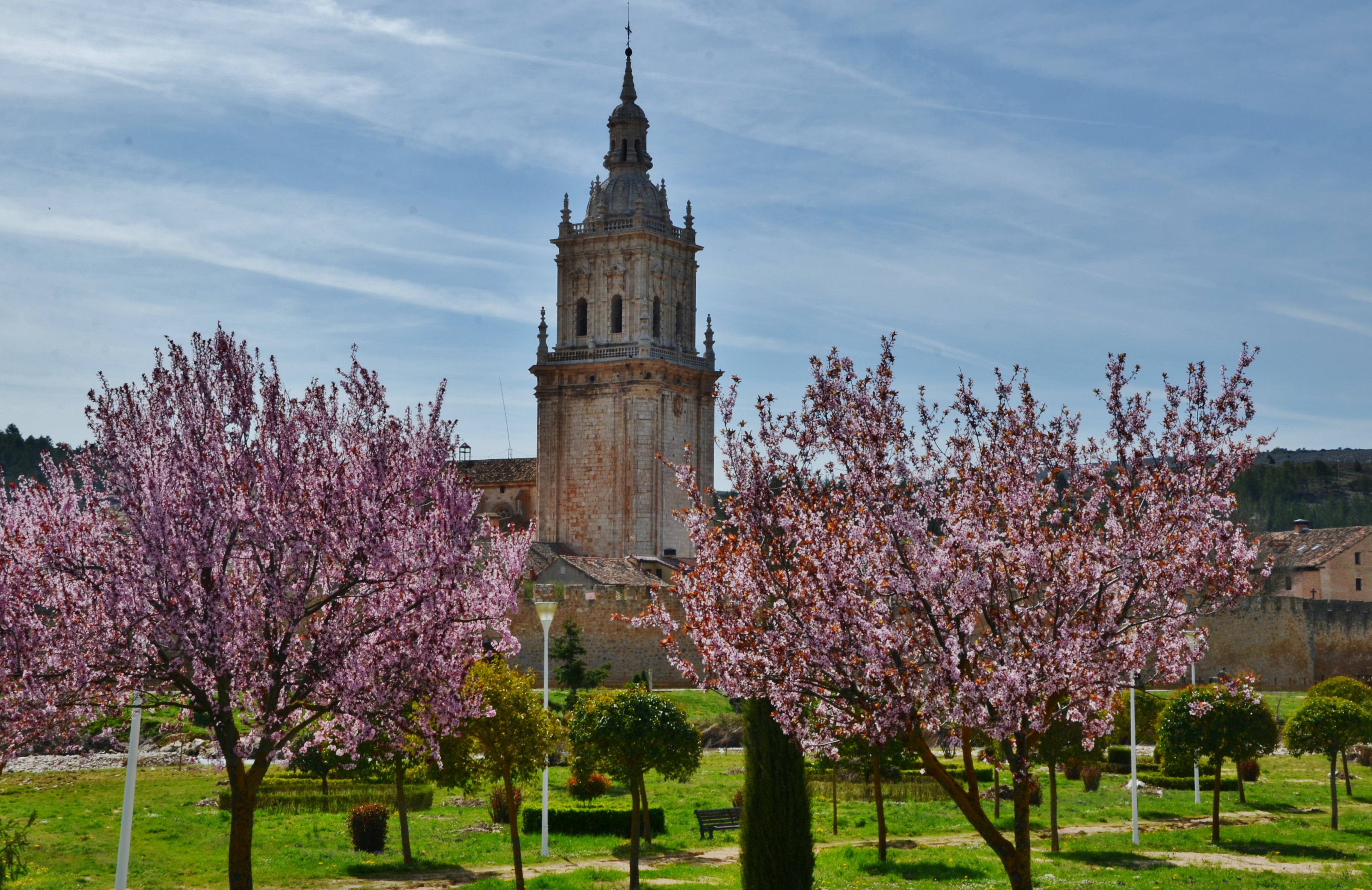 El campanar de l'esplèndida Catedral gótica, amb restes de romànic. el Burgo de Osma, Soria